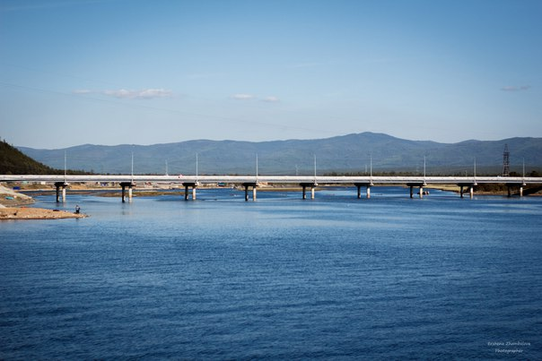 Мост через р. Турка